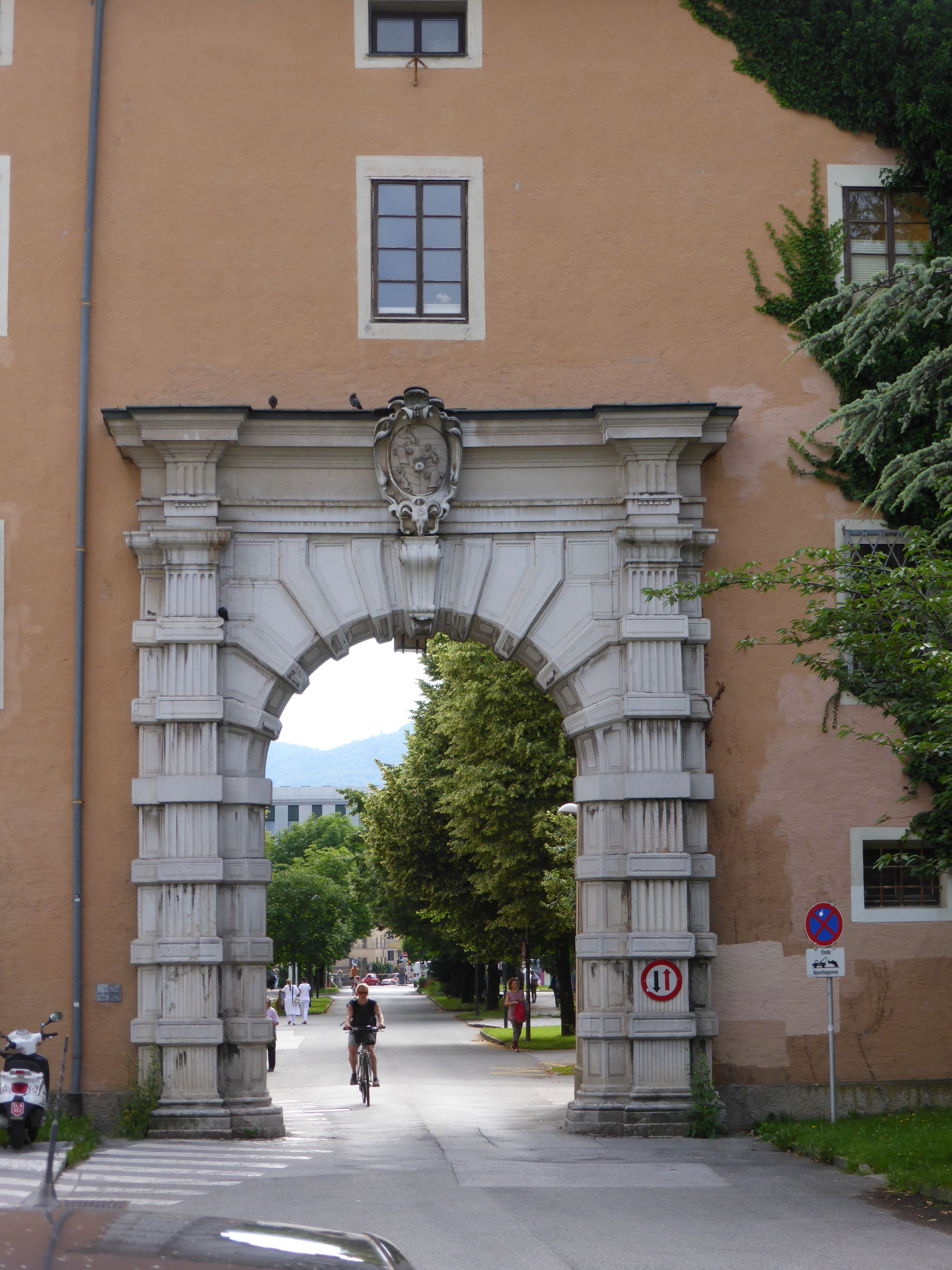 Stadttor im Auftrag Wolf Dietrichs 1606 errichtet